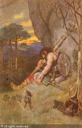 Schlafende Riese mit Zwergen